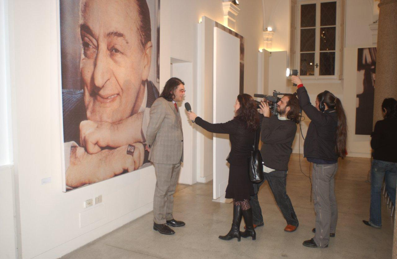 Sfilata e tributo al Principe Antonio de Curtis (Totò), 2005